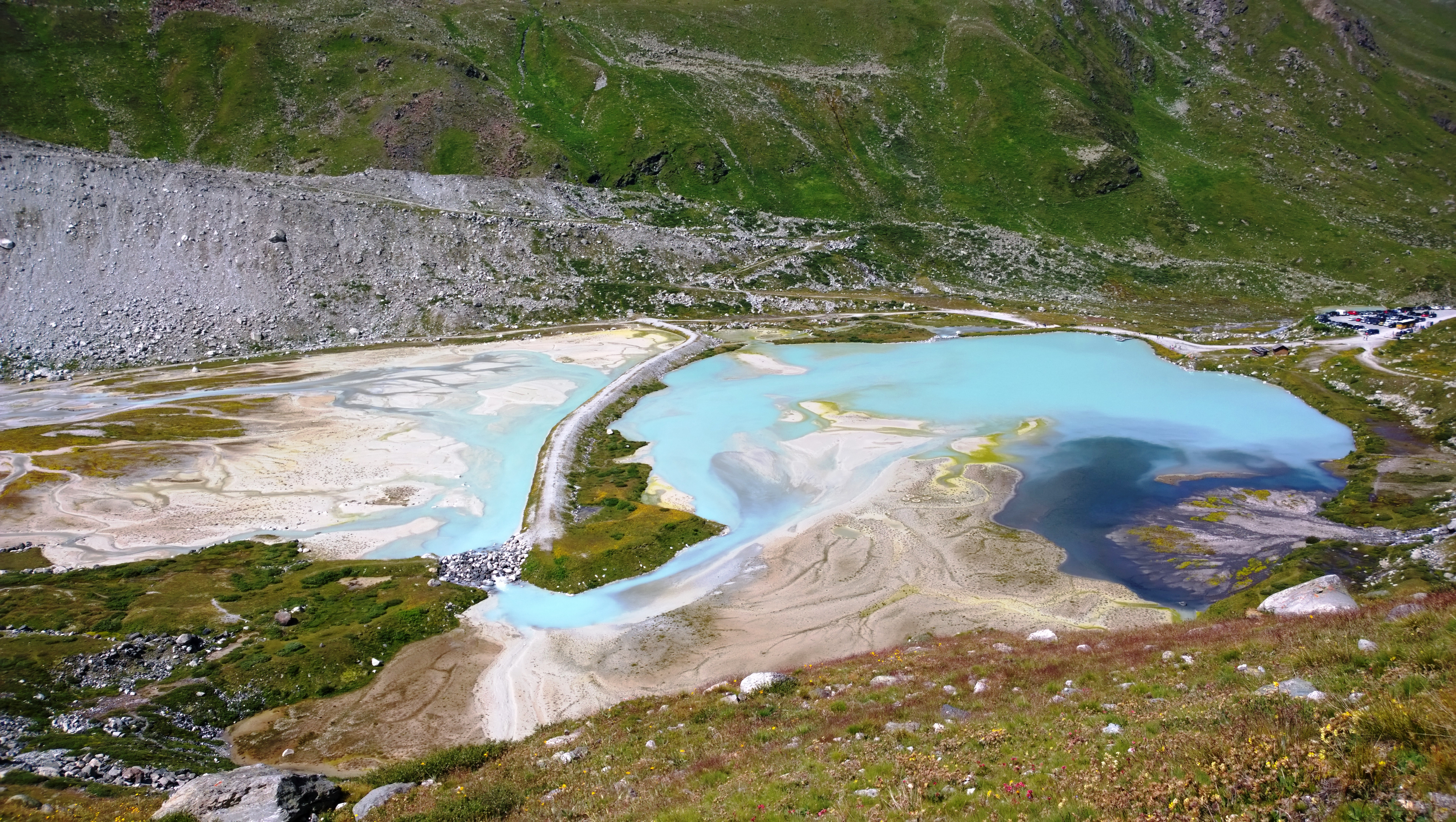 Lac de Châteaupré